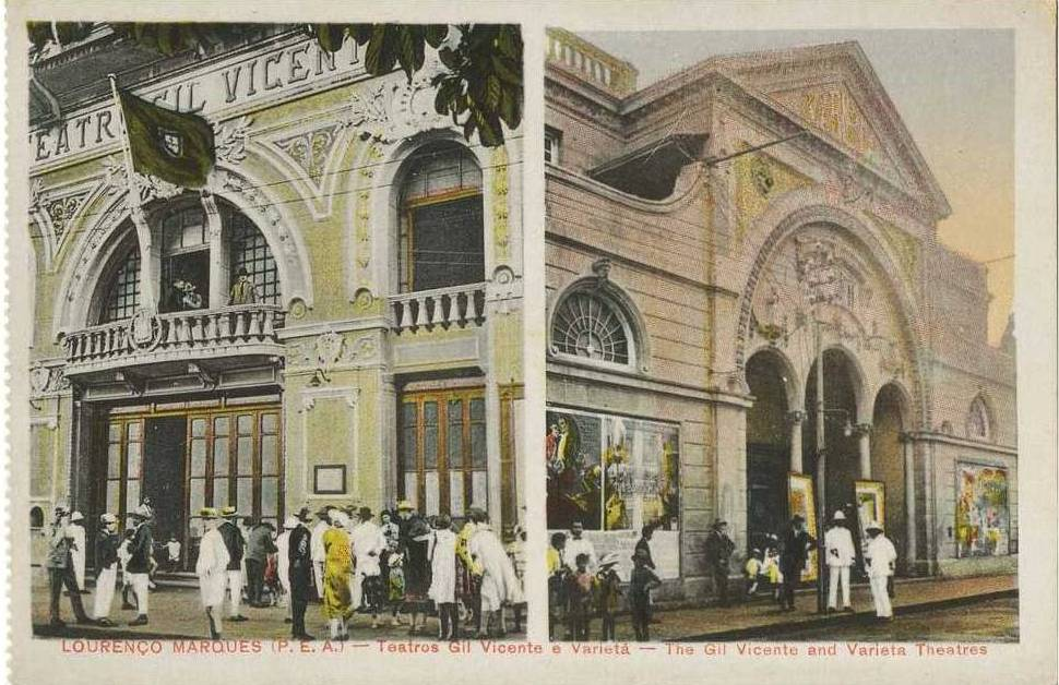 MOÇAMBIQUE LOURENÇO MARQUES - TEATRO Gil Vicente e Varietá (Ed. Santos Rufino)